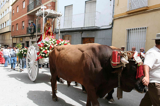 Romería de María Santísima de la Victoria, Martos, Jaén (España).